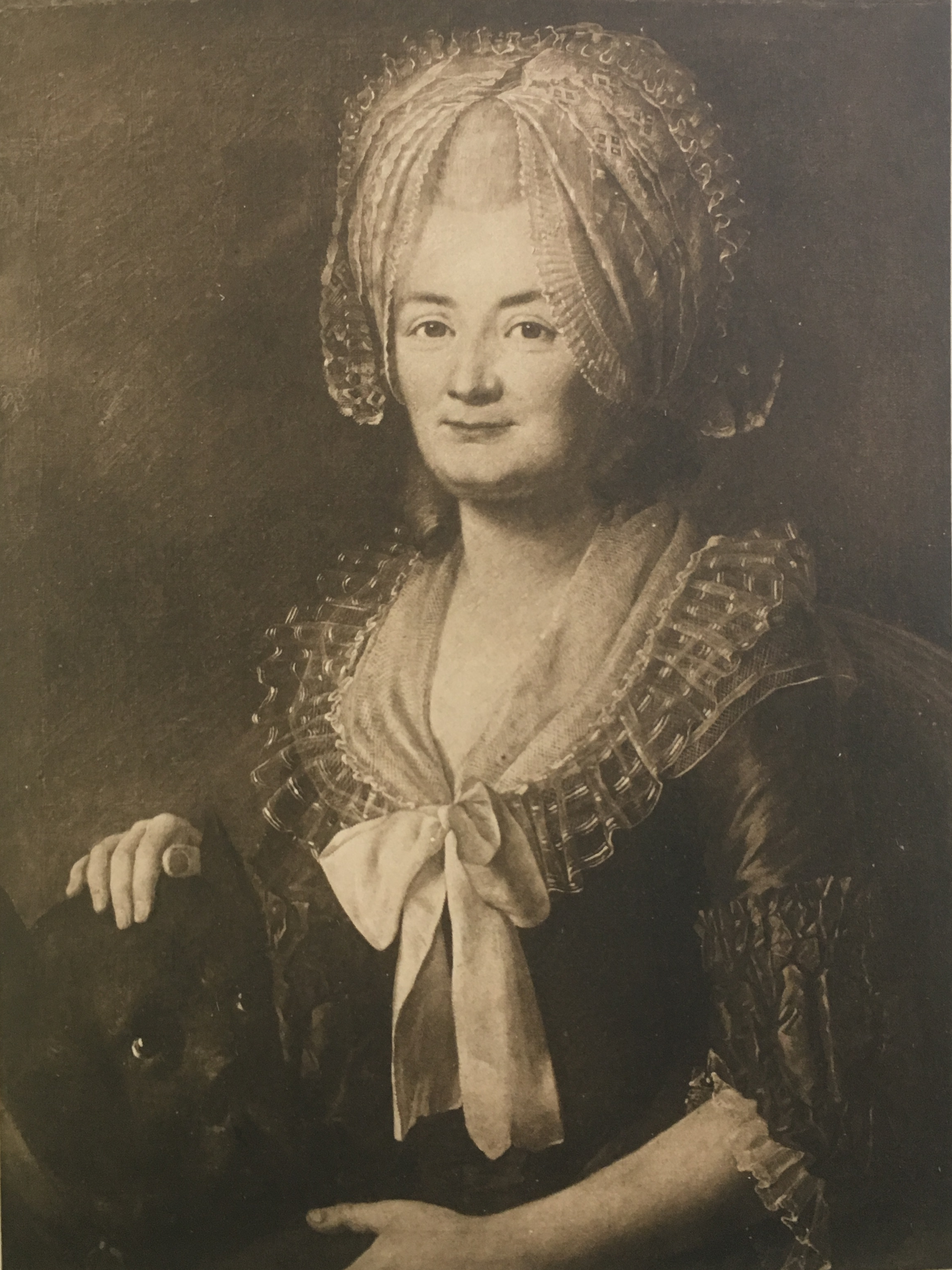 Bildnis Anna Elisabeth Daxelhofer geb. Gatschet